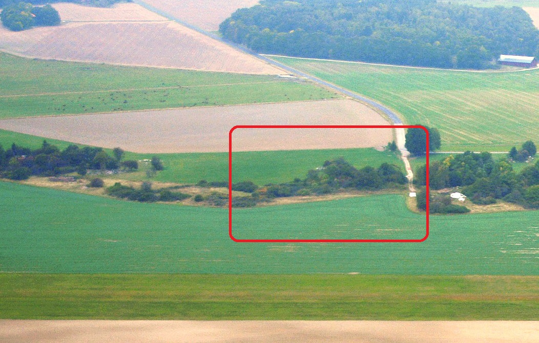 Tunagravfältet, Färingsö, RAÄ-nummer Skå 41:1